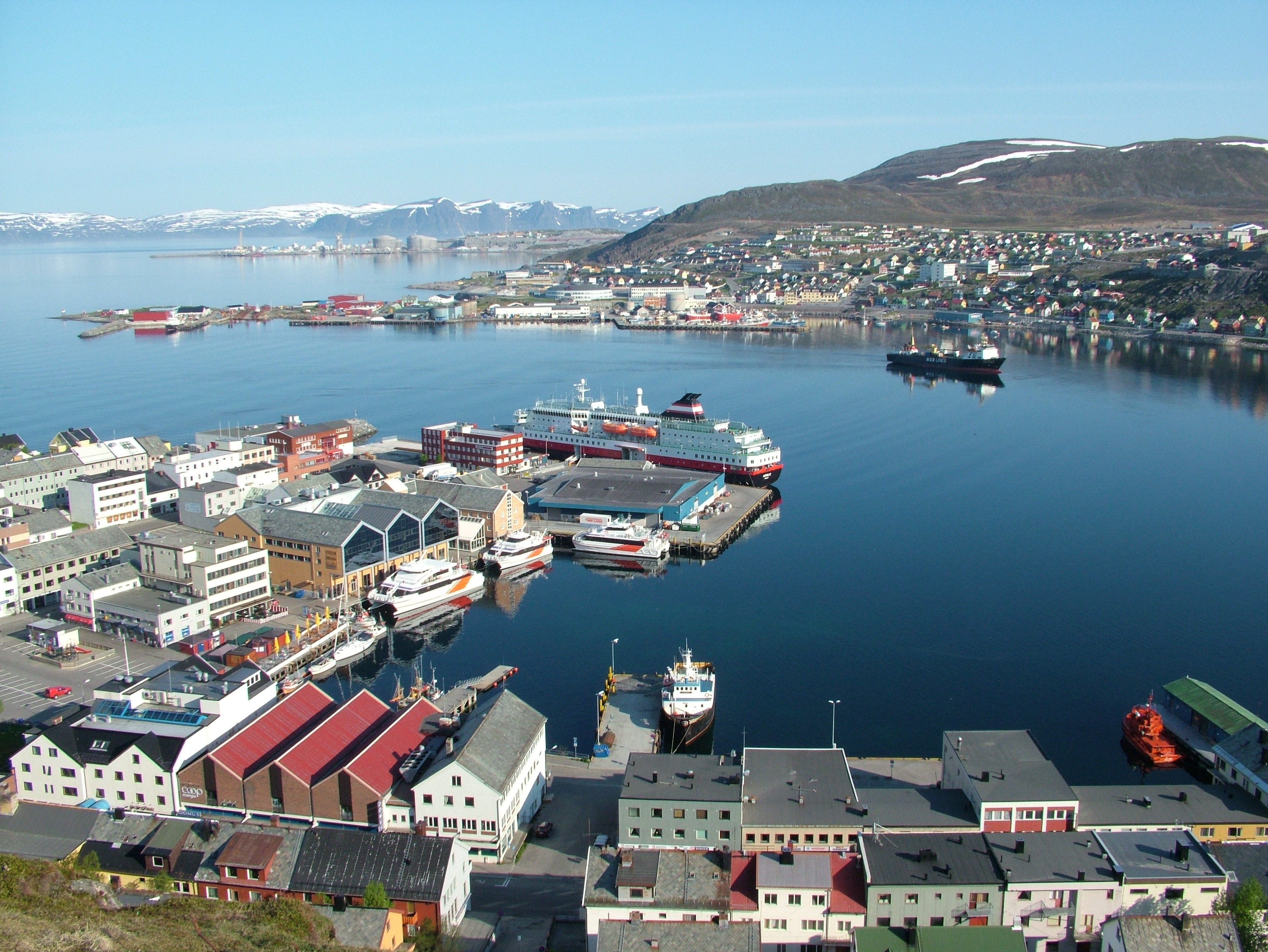 Hammerfest in Nordnorwegen